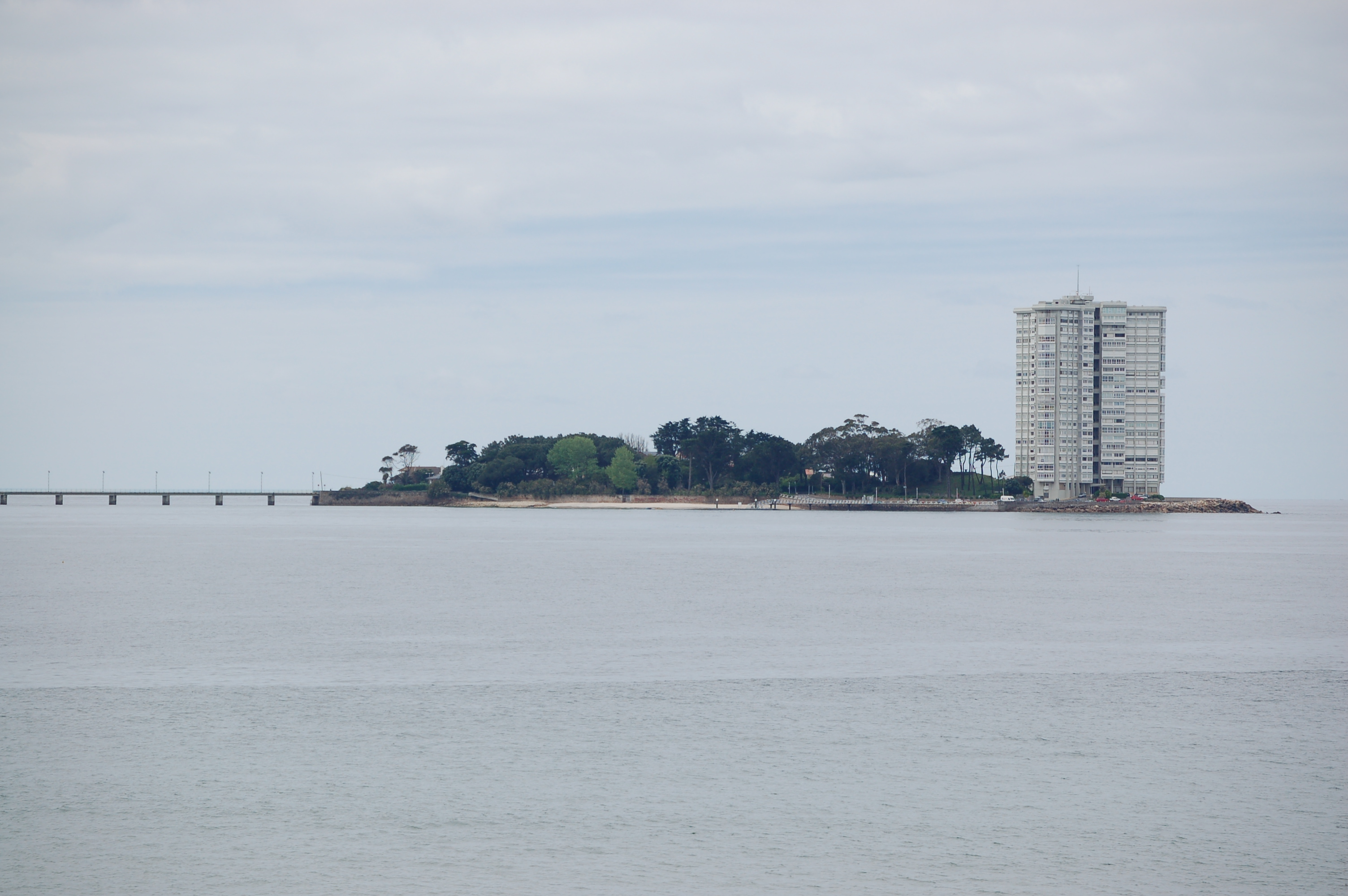 Illa de Toralla